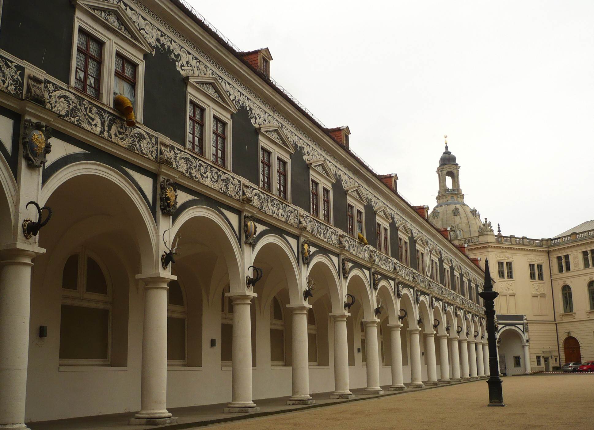 Drezno. Zamek